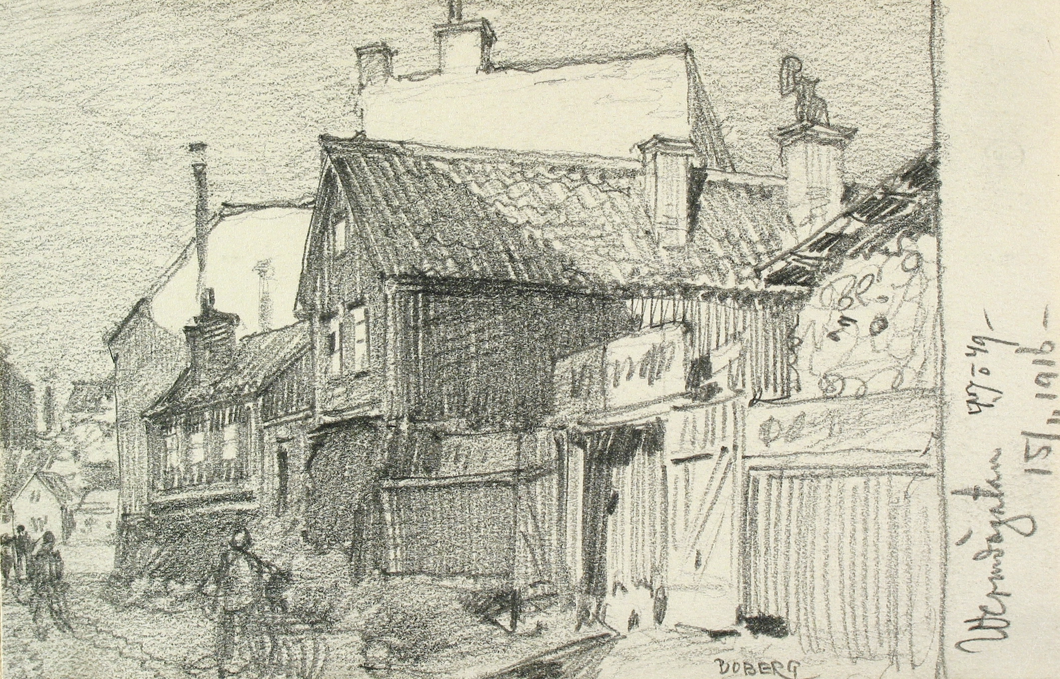 Trähusbebyggelsen vid Nytorget 9 (dåvarande Wintertullsgatan)